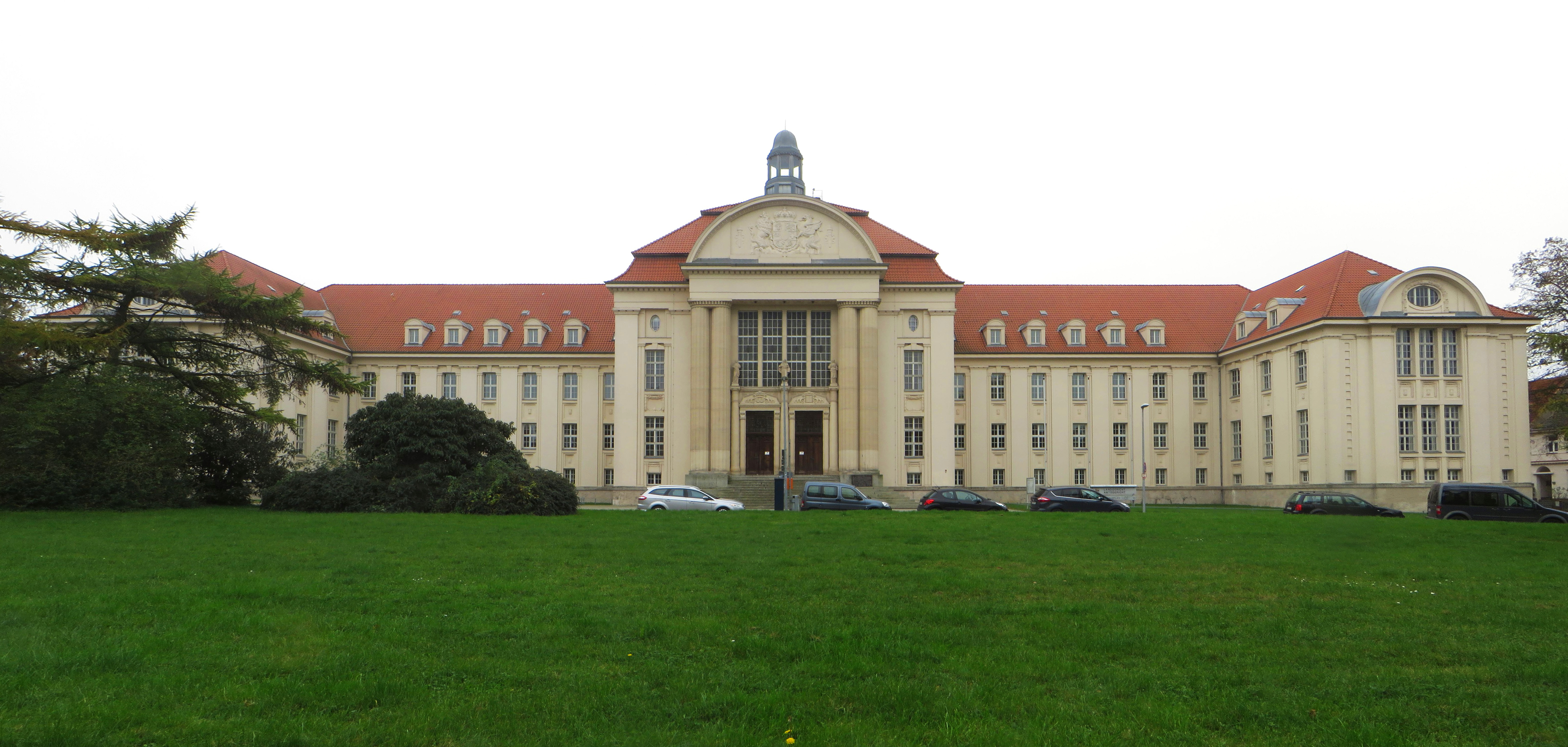 Gebäude des Landgerichtes Schwerin und des Amtsgerichtes Schwerin NOTE: This image is a panorama consisting of 3 frames that were merged in software. As a result, this image necessarily underwent some form of digital manipulation. These manipulations may include blending, blurring, cloning, and color and perspective adjustments. As a result of these adjustments, the image content may be slightly different than reality at the points where multiple images were combined. This manipulation is often required due to lens, perspective, and parallax distortions.